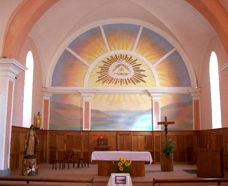 Le choeur de l'église